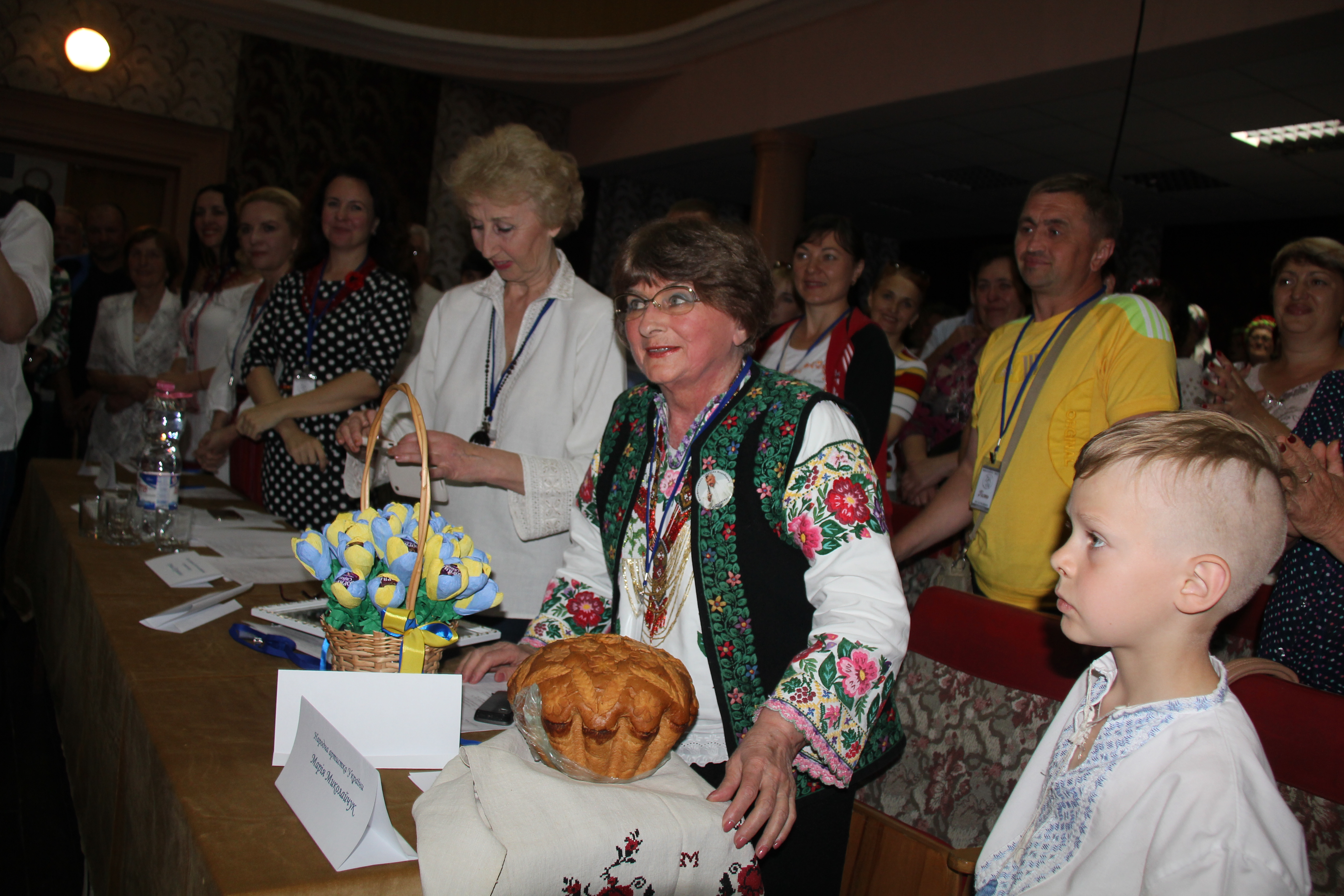 Почесний голова журі - Марічка Миколайчук.